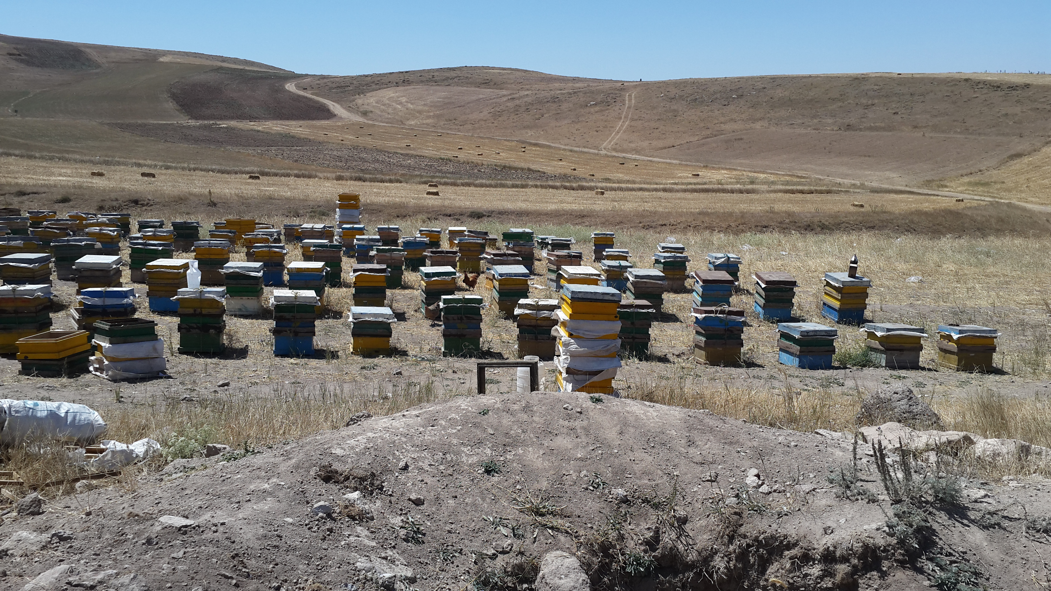 زنبورداری در روستای اباذر